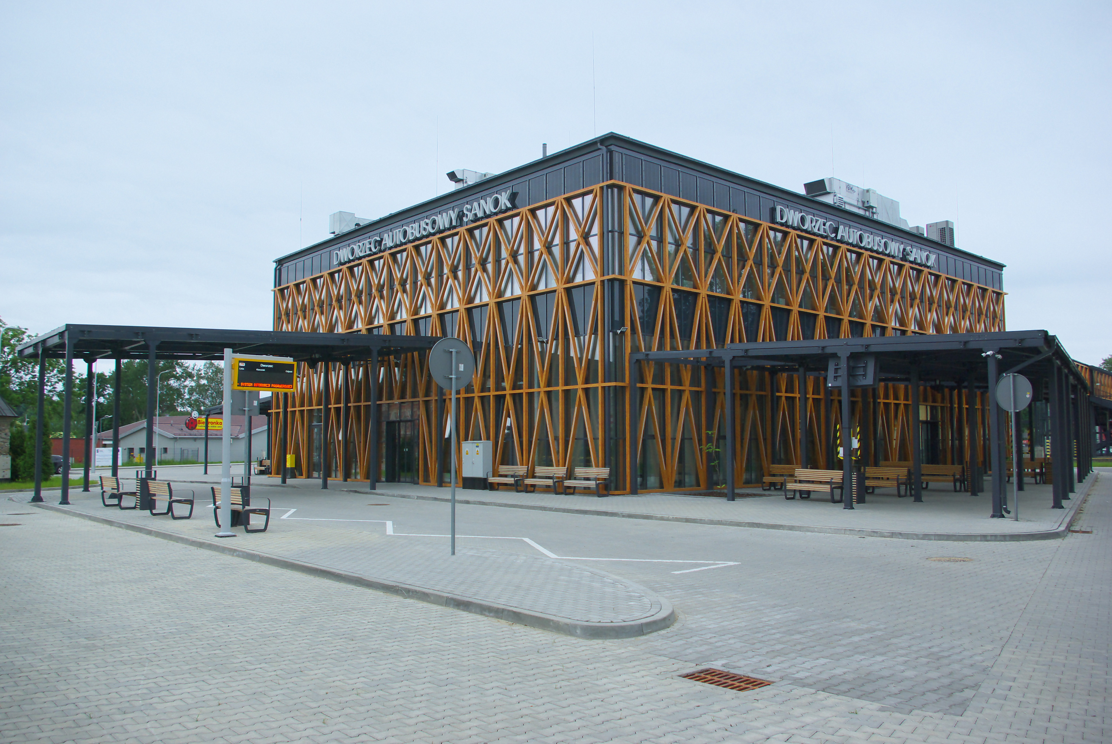 Dworzec autobusowy przy ul. Kazimierza Lipińskiego w Sanoku po unowocześnieniu z 2019.